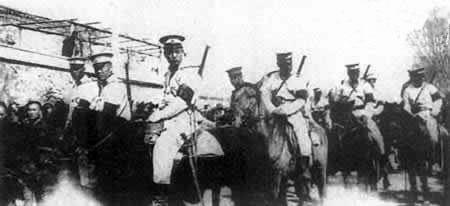 冯国璋大总统出殡。